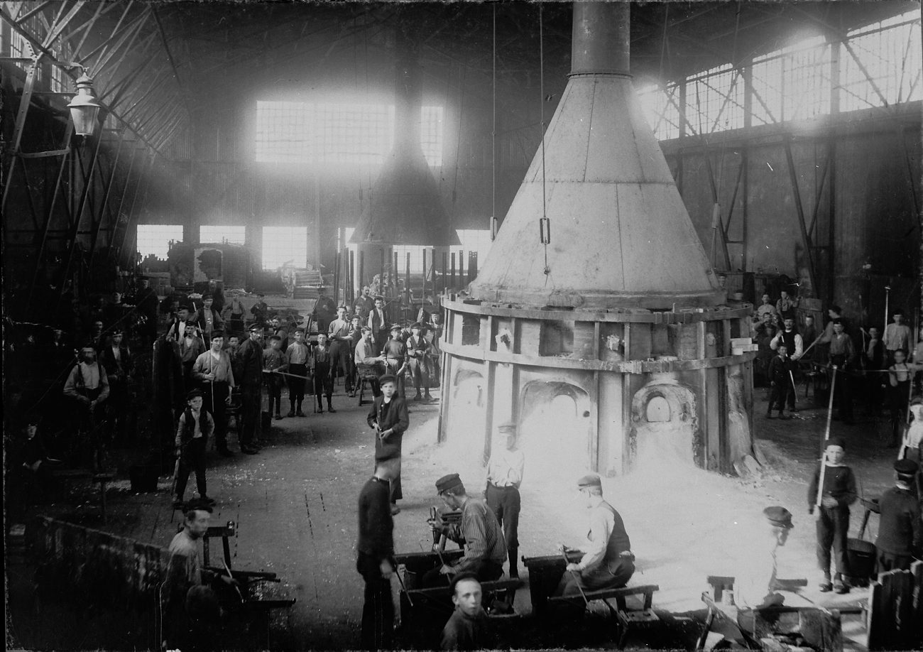 B13376. Orrefors Glasbruk. Fotografiet är skänkt till Tekniska museet från Svenska Turistföreningen.